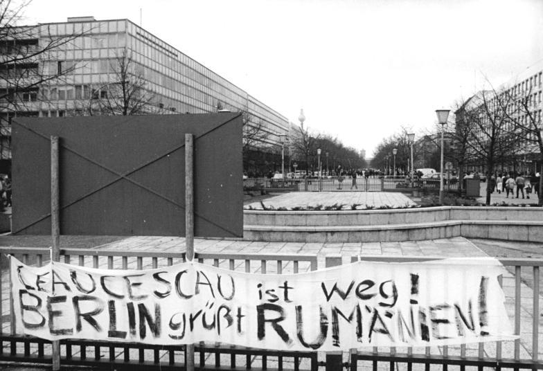 Berlin, Brandenburger Tor, Transparte zu Rumänien ADN-ZB Link 23.12.89 Berlin: Brandenburger Tor Am neuen Grenzübergang herrscht reger Betrieb. Auf Transparenten solidarisieren sich die Berliner mit dem rumänischen Volk.